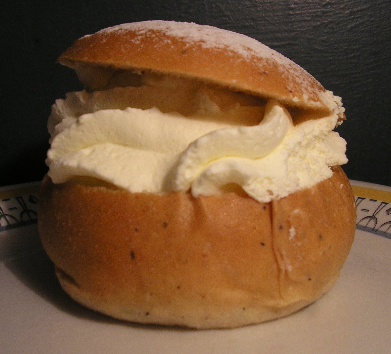 A semla.